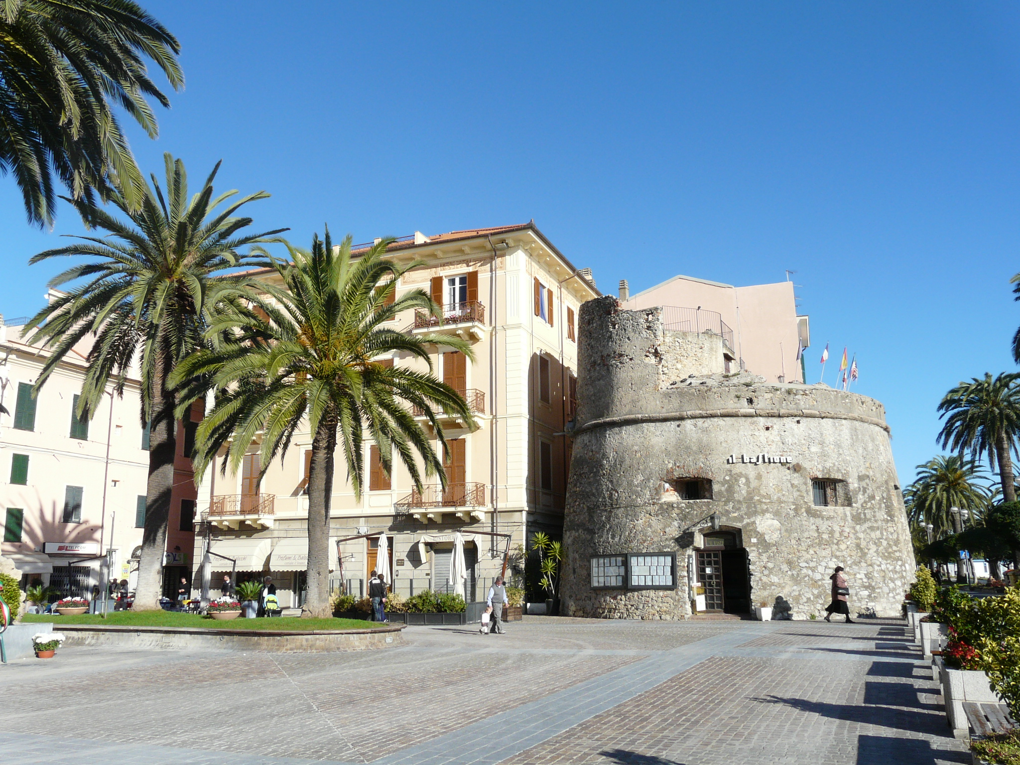 Torrione di Ceriale, Liguria, Italia